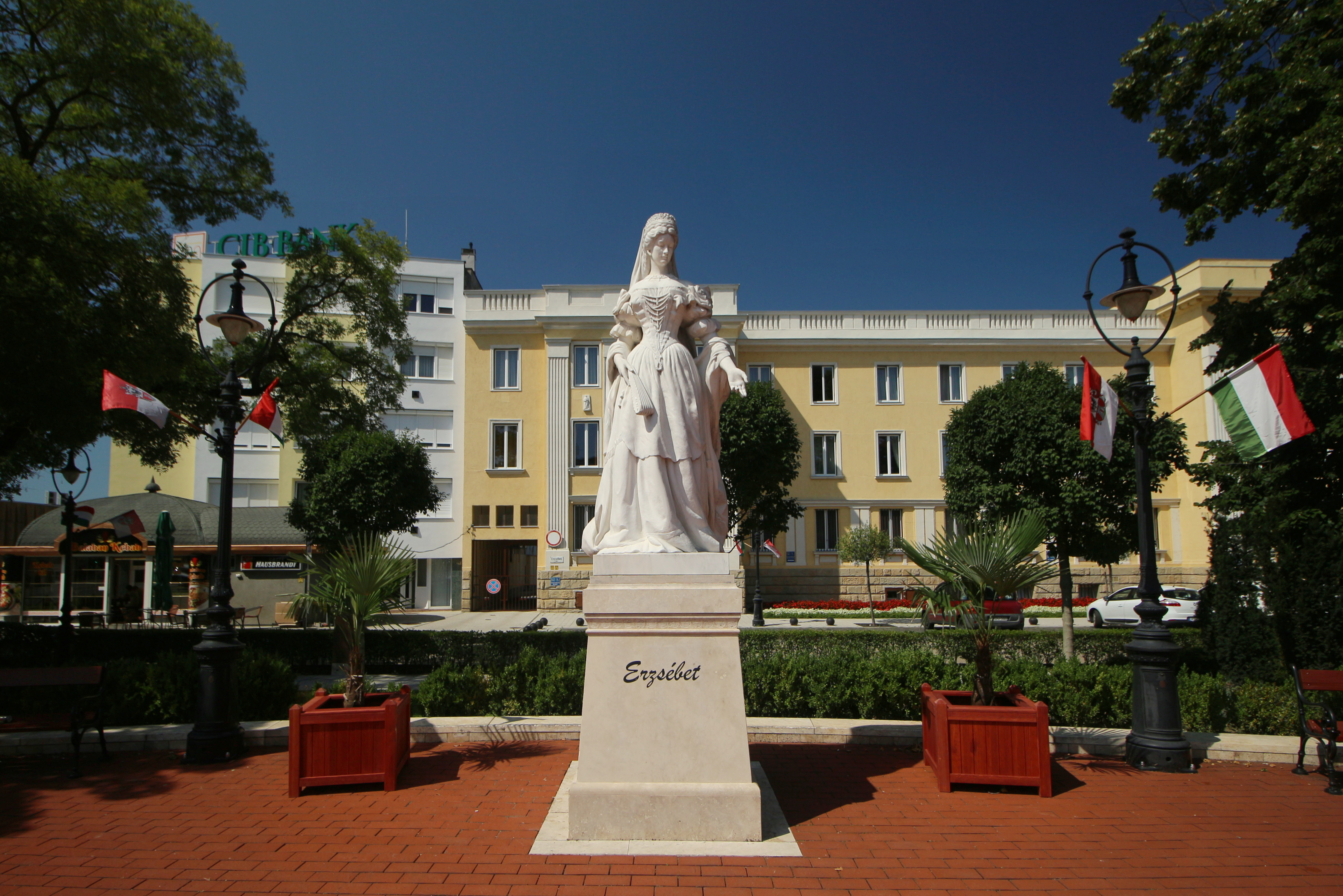 Nagykanizsa (Velká Kanyže) náměstí císařovny Alžběty v centru města